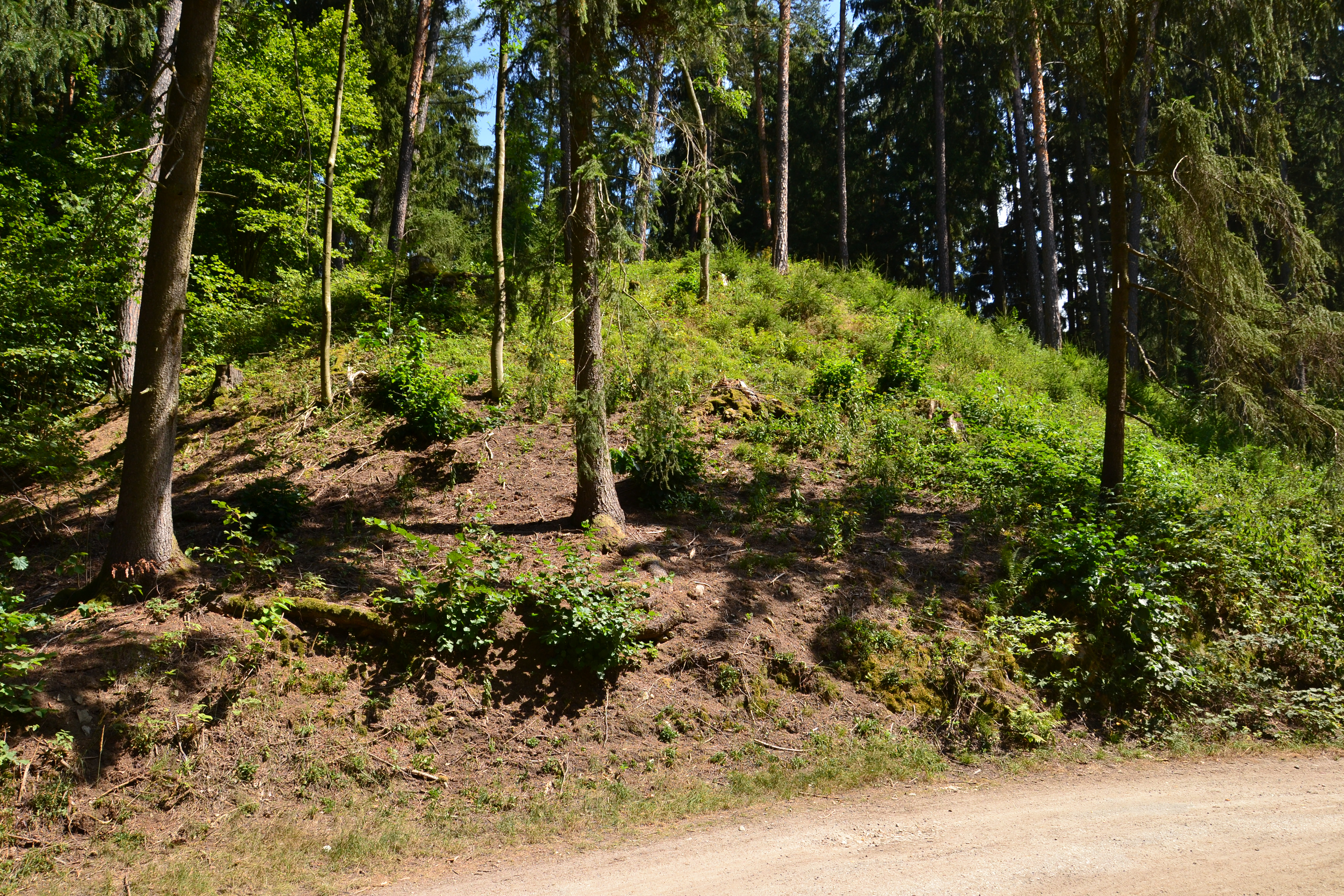 Celkový pohled na hradní jádro z příkopu